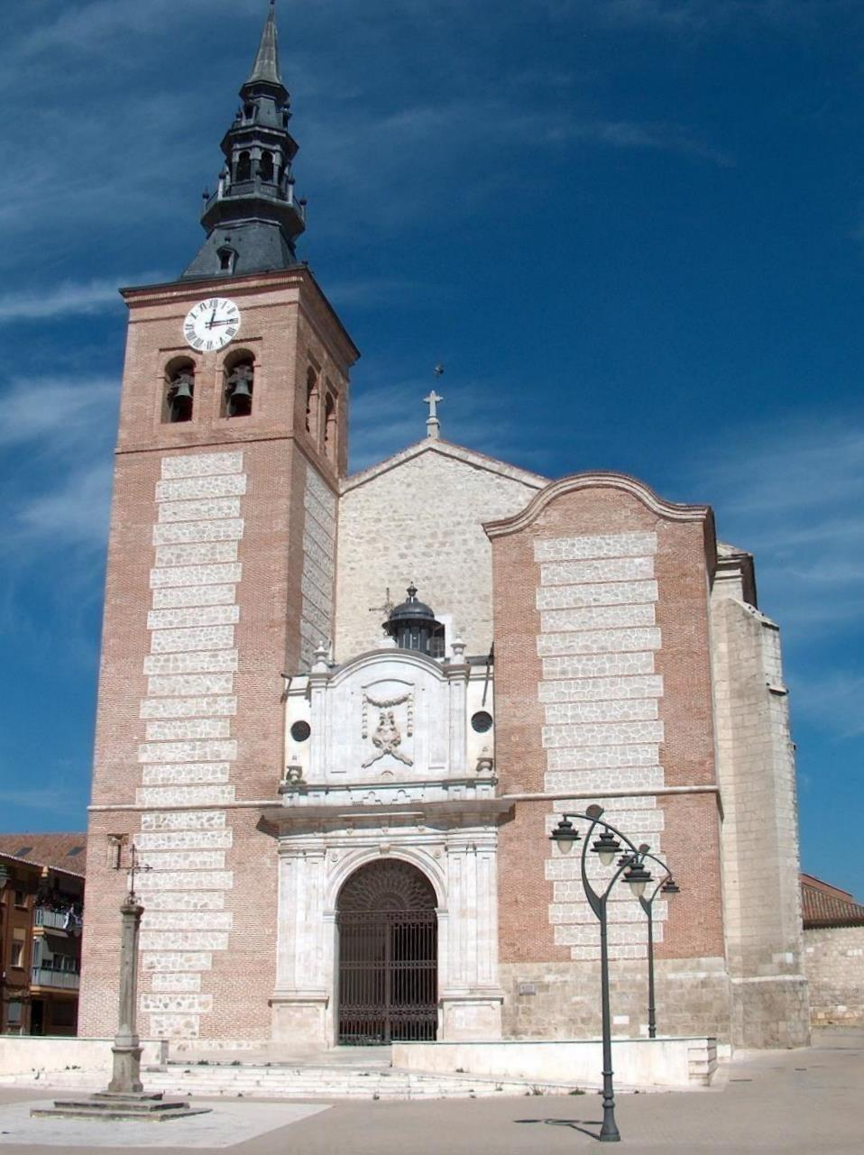 Catedral de Getafe (Madrid) - Santa María Magdalena, fachada.